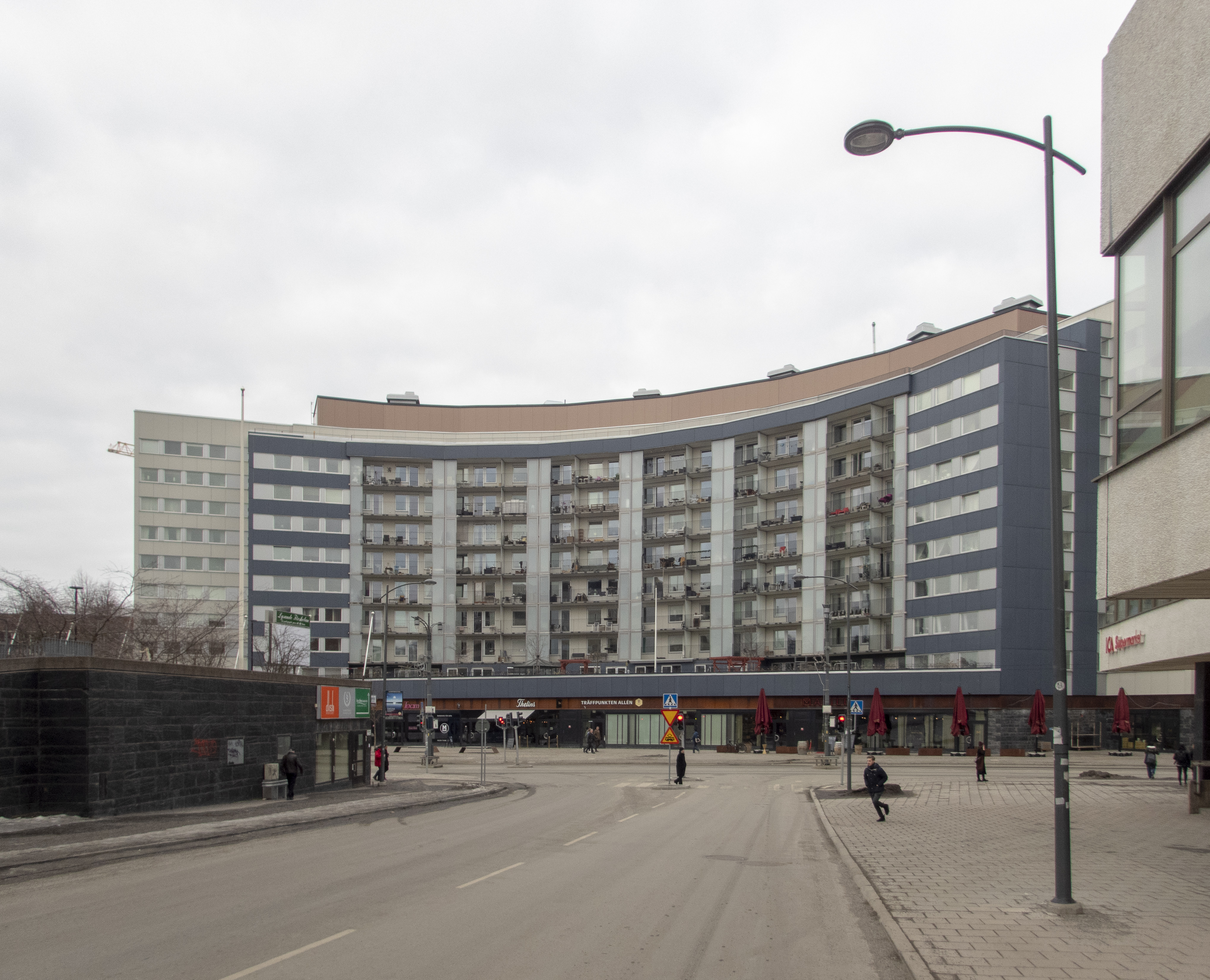 Banken 8, Landsvägen 58-62 Sundbyberg. Byggnadsår 1966-69, byggmästare Skånska Cementgjuteriet. Arkitekt: Åke Östin Senare fasadförändringar